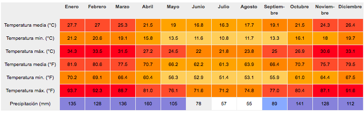 Tabla climática de la Ciudad de Caá Catí, Corrientes, Argentina.